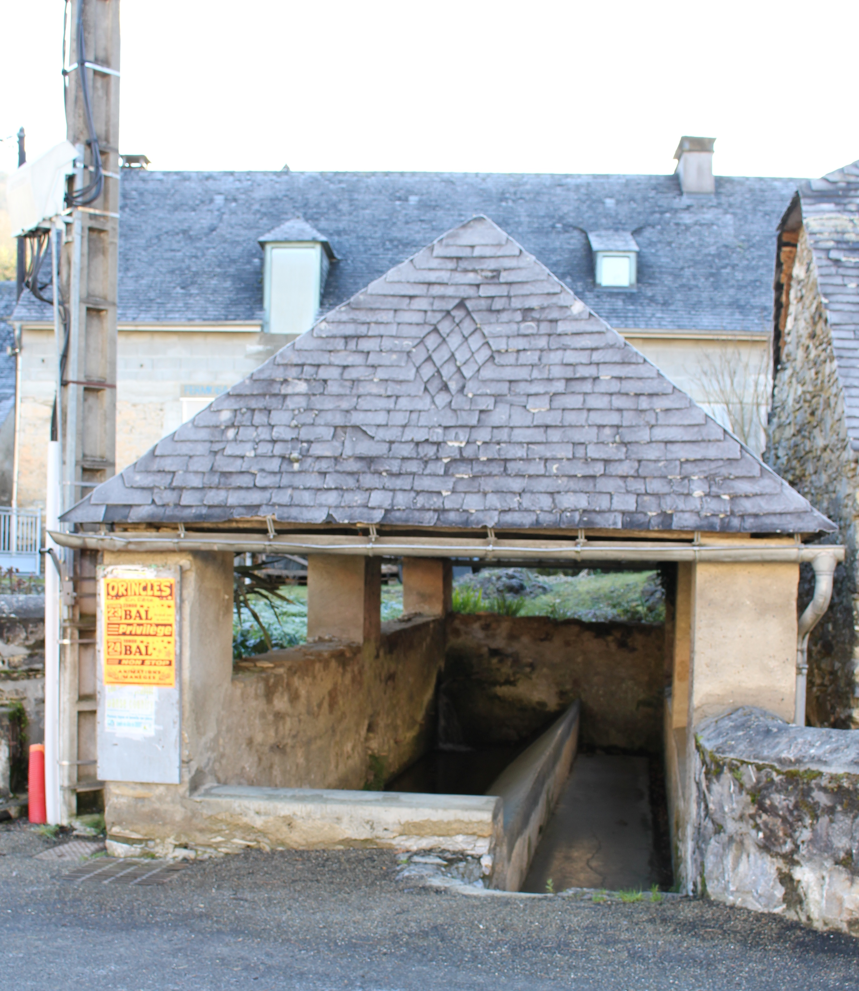 Lavoir de Cheust (Hautes-Pyrénées)